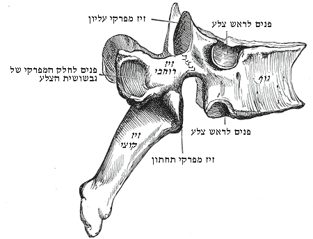 חוליה חזית במבט צד